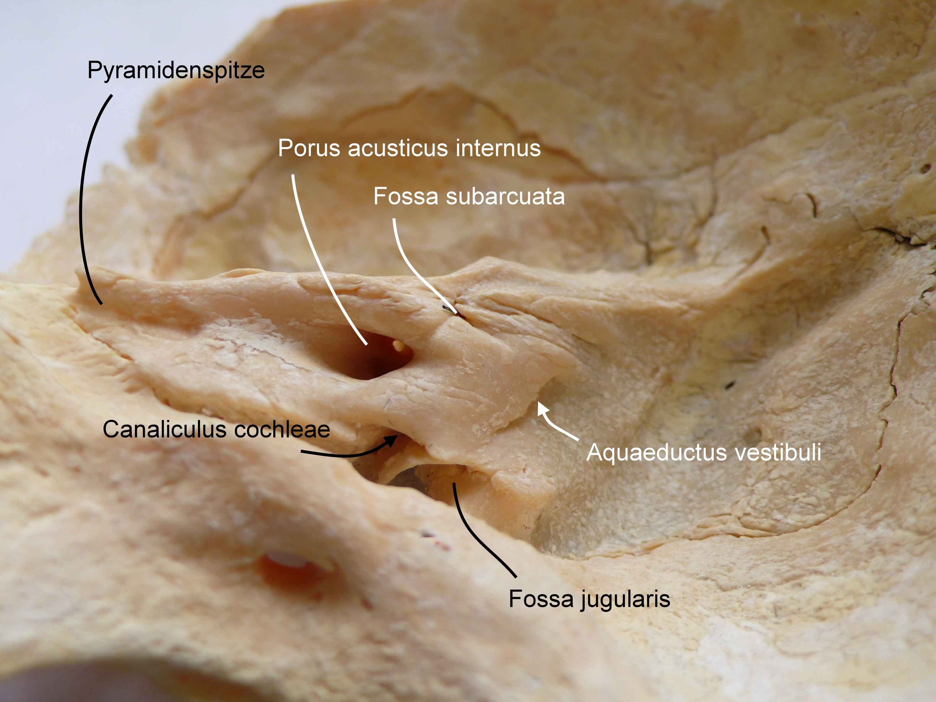 Os temporale, pars petrosa, facies posterior